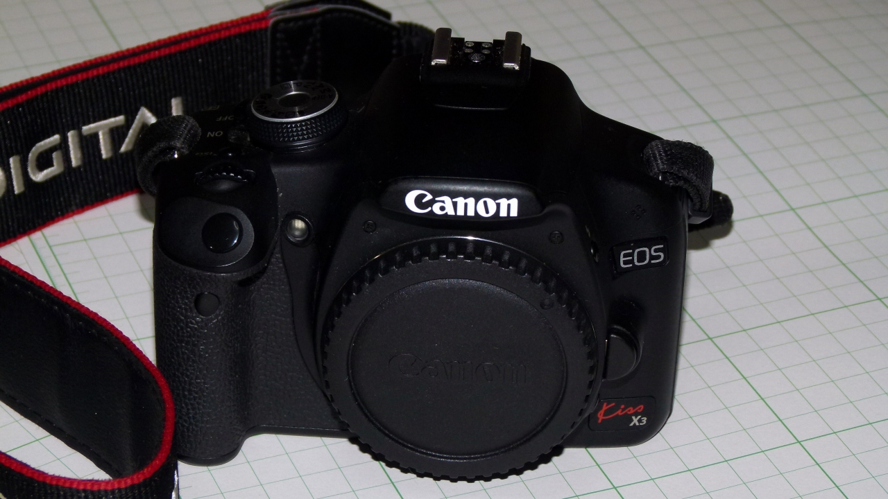 EOSデジタルシリーズにてx3だけ無かったのでアップ。